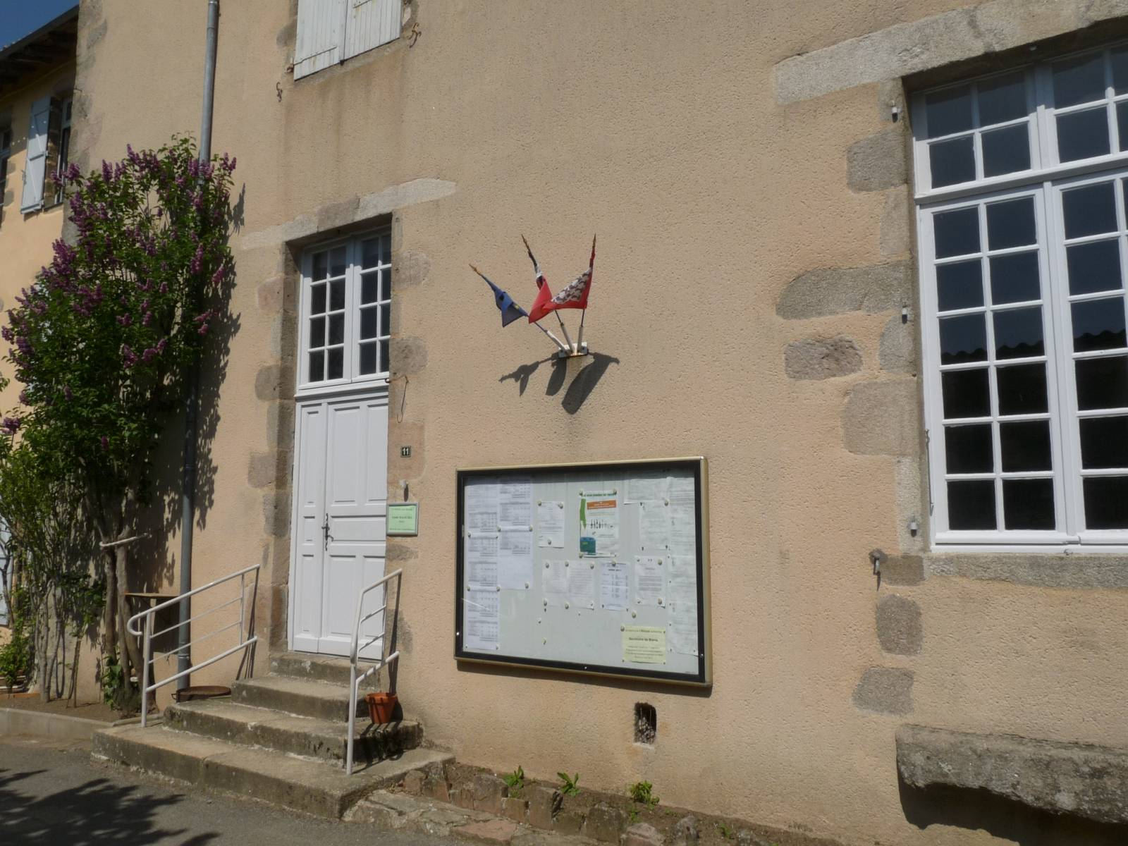 Mairie de Lesterps, Charente, France